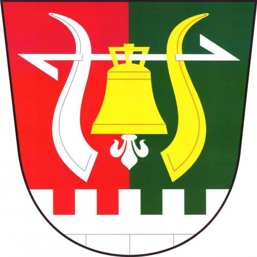 znak, Skřinářov, okres Žďár nad Sázavou